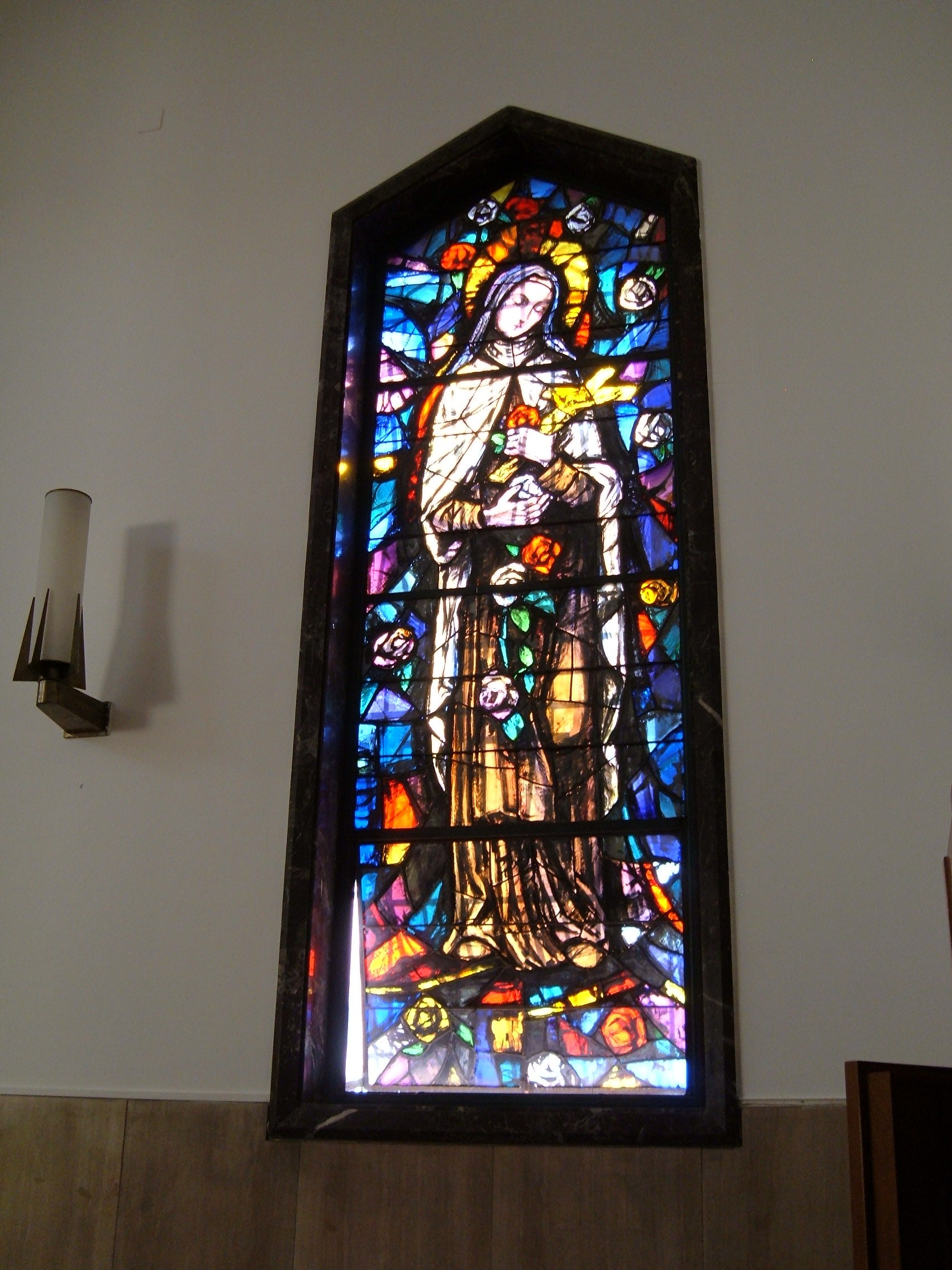 Chiesa di Santa Maria Immacolata di Lourdes, a Roma, nel quartiere Aurelio (via di Santa Bernadette). Interno: vetrata.